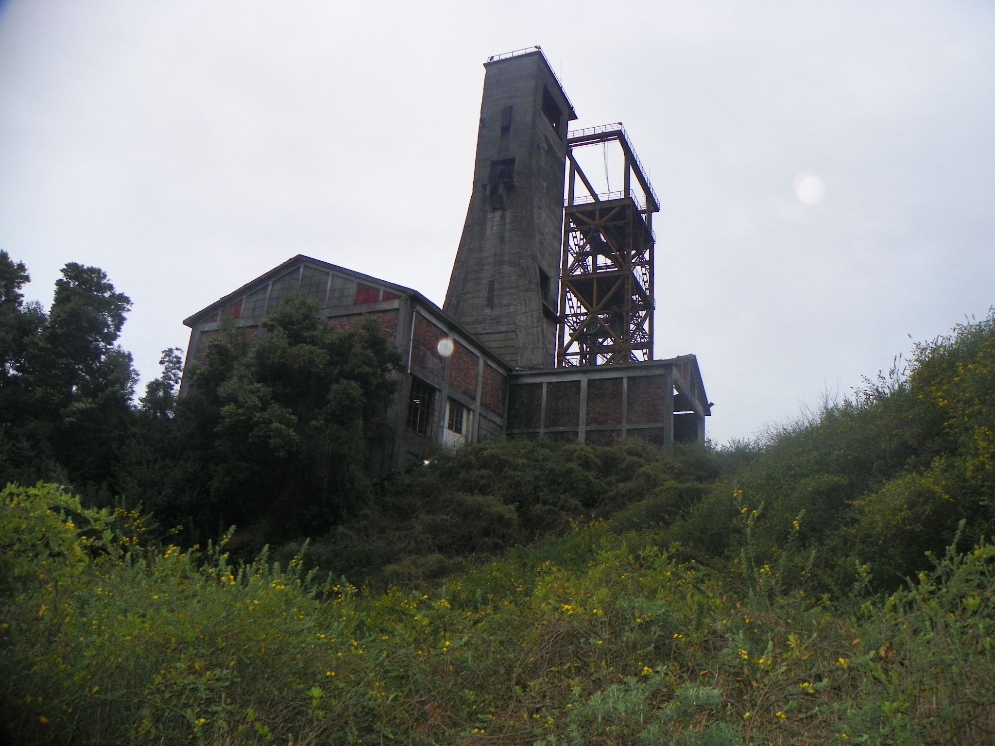 Vista lateral de estructuras.